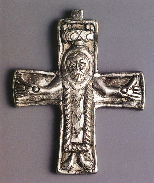 Stříbrný závěsný křížek zobrazuje v reliéfu postavu Ukřižovaného, oděného v dlouhé tunice s širokým lemováním. Nad hlavou Krista je štítek, snad s písmeny CCXO, které mohou být nepochopenou původní symbolikou slunce a měsíce. Maskovité zdůraznění hlavy s expresivním výrazem tváře je spojováno s iroskotským uměním, oděv Krista a celkové pojetí křížku je naopak považováno za doklad východního, nejspíše syrského původu. Nelze vyloučit ani vlivy umění koptského. Nejbližší analogií zůstává dvoustranný olověný křížek z bývalého kláštera sv. Kláry v Mohuči. Mikulčický křížek byl nalezen v sídlištní vrstvě 6 m jižně od baziliky a možná pochází z některého porušeného hrobu.